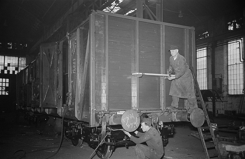 Original image description from the Deutsche Fotothek Arbeiten an einem Güterwaggon